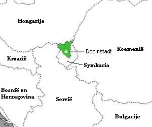 Deze afbeelding is een door mij bewerkte versie van een afbeelding afkomstig van de Engelstalige wikipedia. Het adres is: De afbeelding is vrijgegeven door de maker en mag overal worden gebruikt.